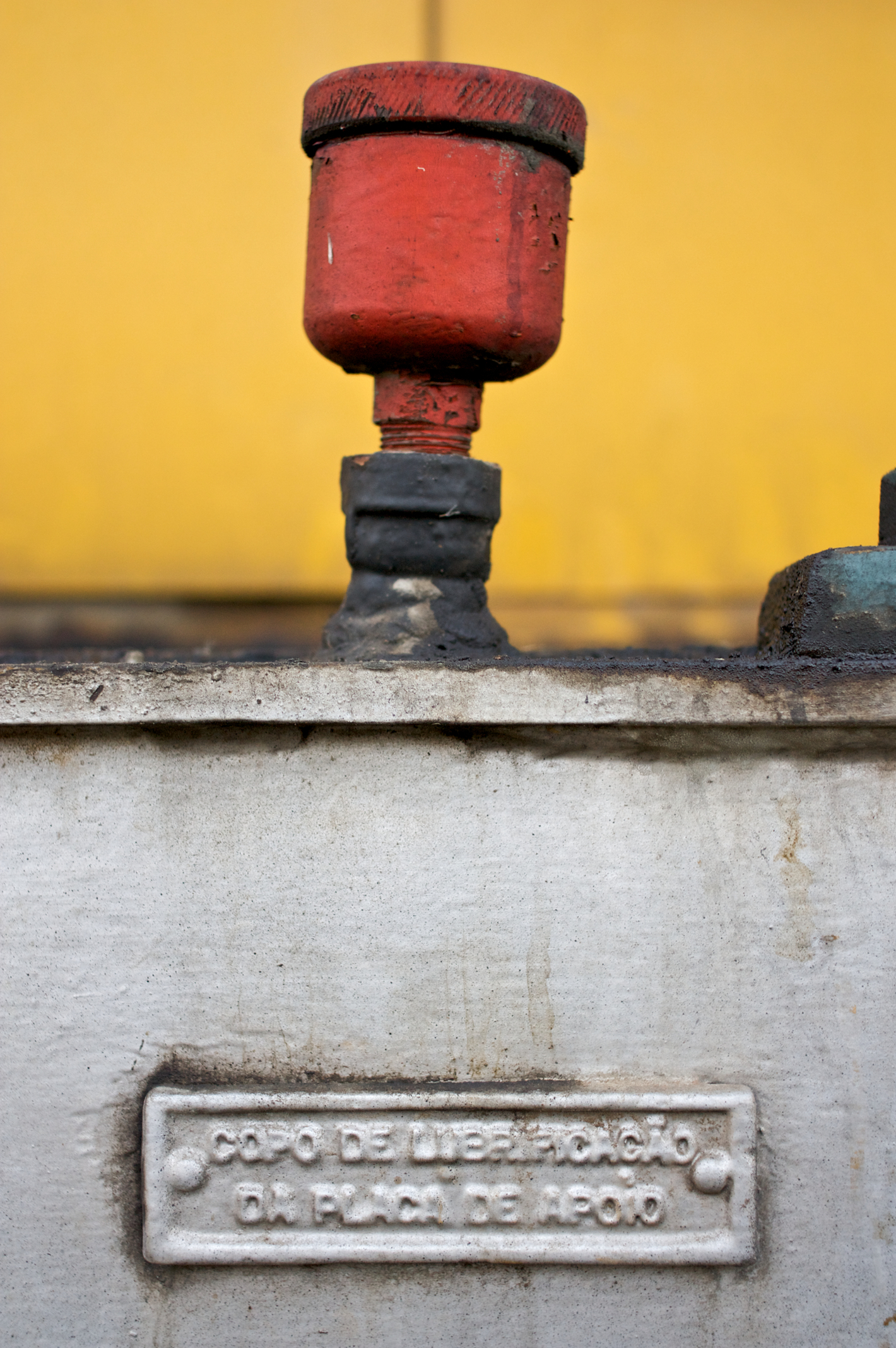 pormenor do copo de lubrificação da placa de apoio. Local: Estação de Alcácer do Sal [Linha do Sul, PK 78] Data e hora: 11 de Outubro de 2010 [19h02] Material: Locomotiva 1511 [Alco] N.º UIC: 93 94 200 0031-6 P (Somafel 1420)